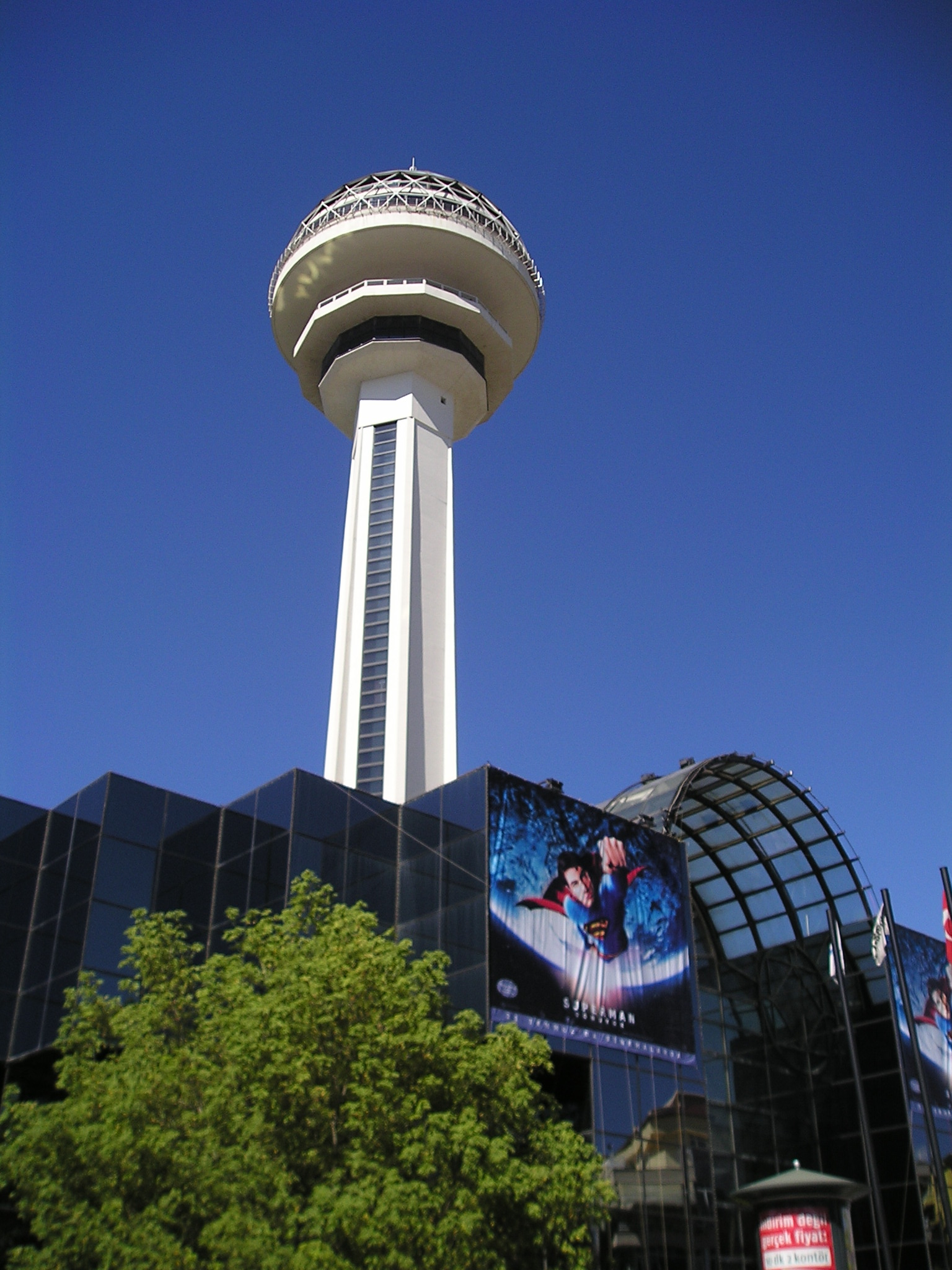 Description Foto van Atakule (toren) in Ankara, Turkije. DateJuly 2006SourceOwn workAuthorScisaPermission (Reusing this file) Vrij voor gebruik Foto van Atakule (toren) in Ankara, Turkije.